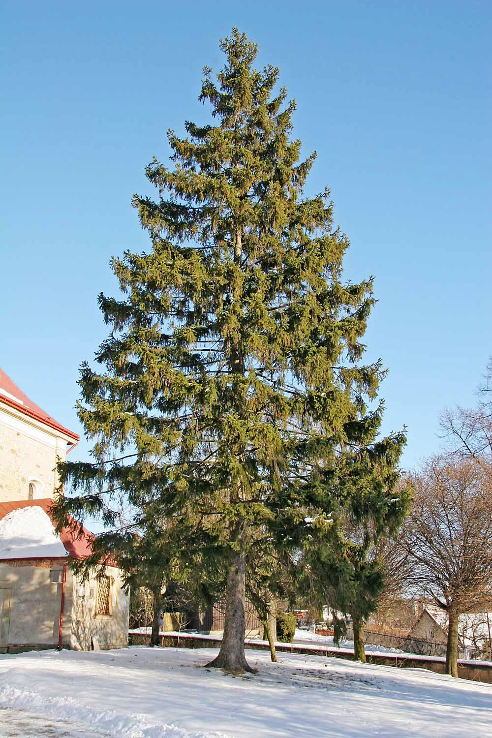 Picea abies